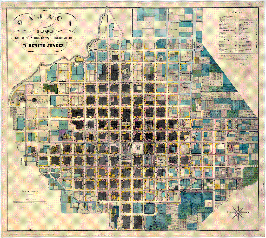 Es un plano sobre la Ciudad de Caxaca